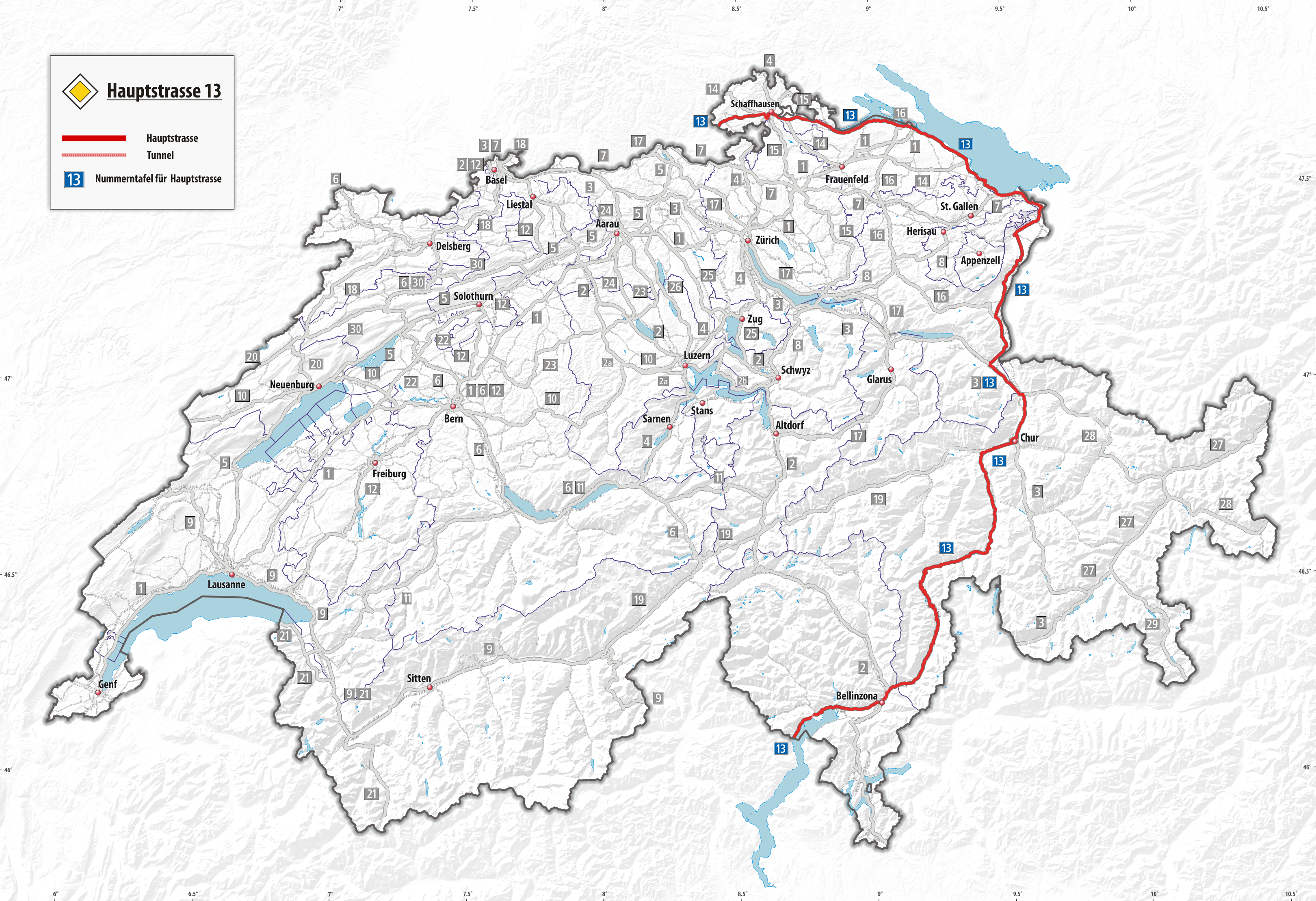 Hauptstrasse 13 der Schweiz